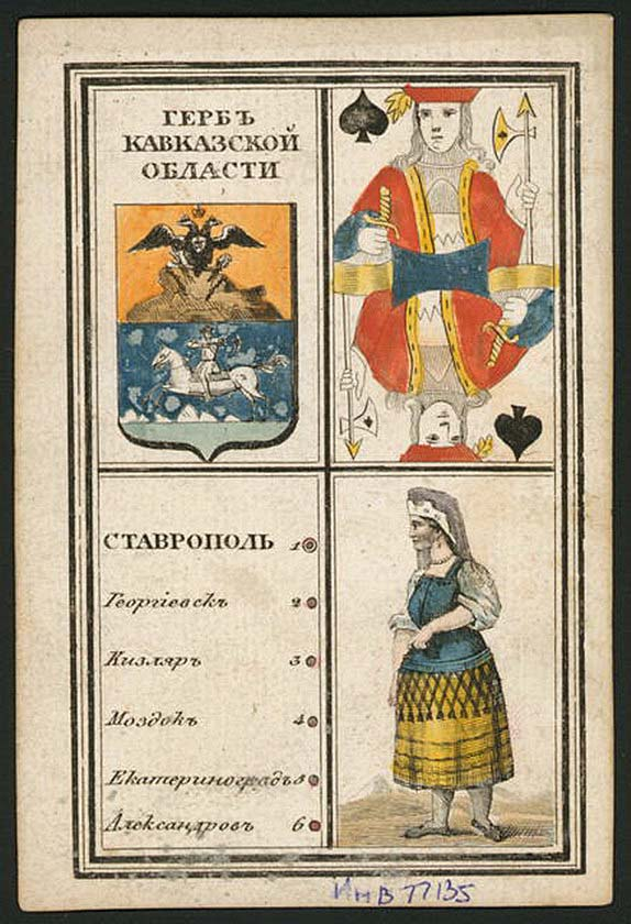 Игральная карта из царской колоды, Герб кавказской области